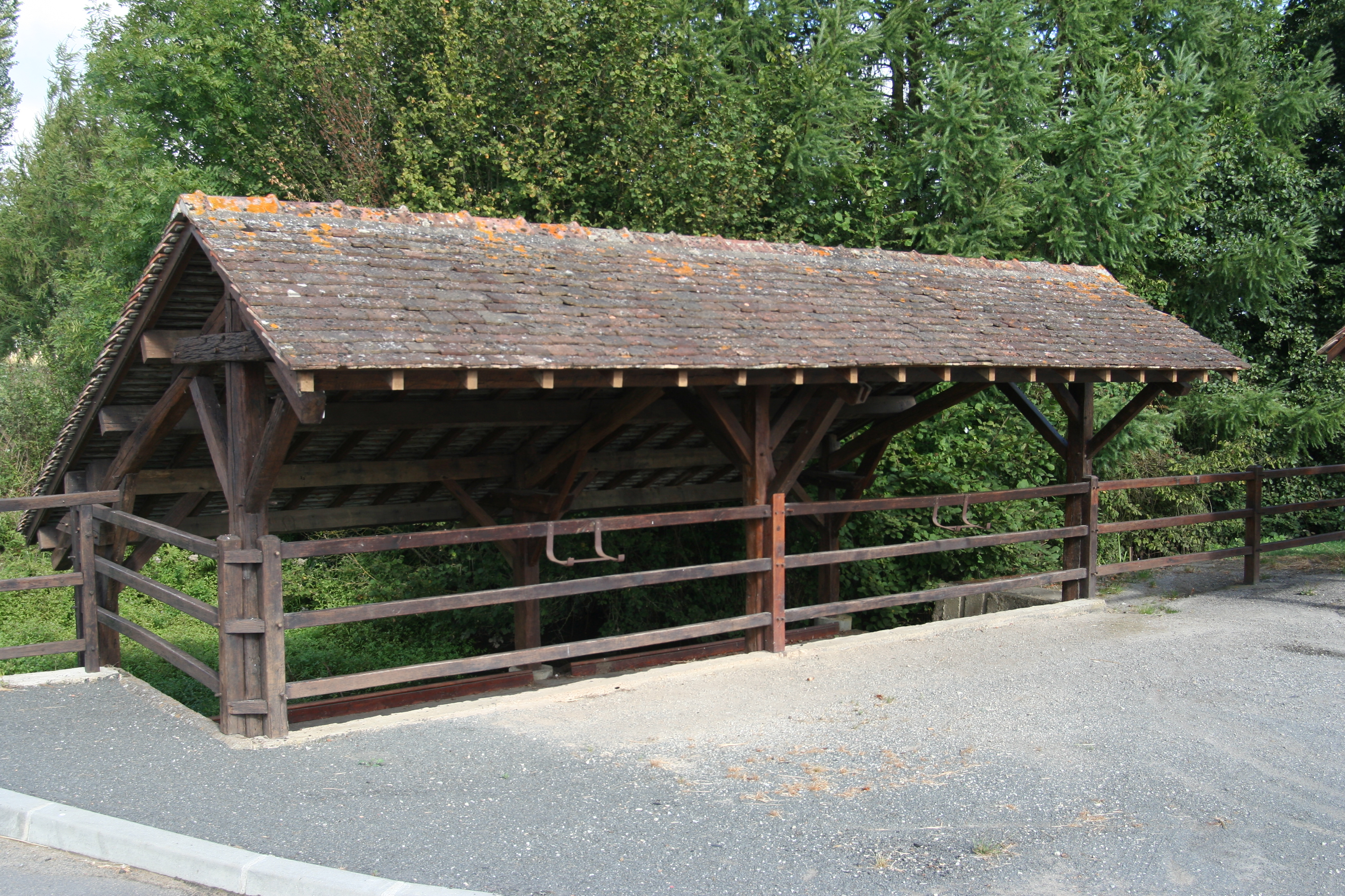 Le lavoir de Courcemont.